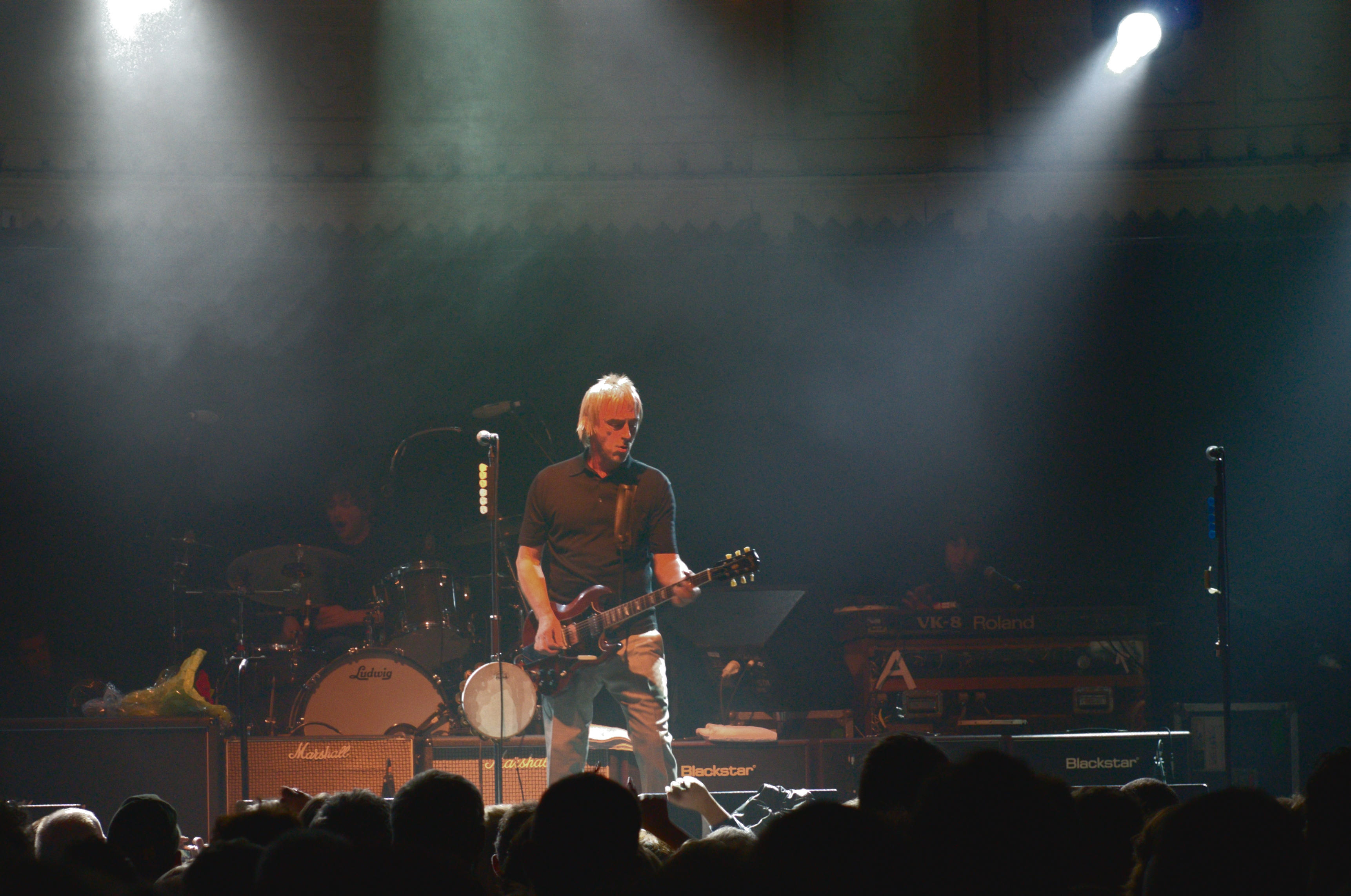 Concert de Paul Weller le 4/09/08 au Paradiso à Amsterdam